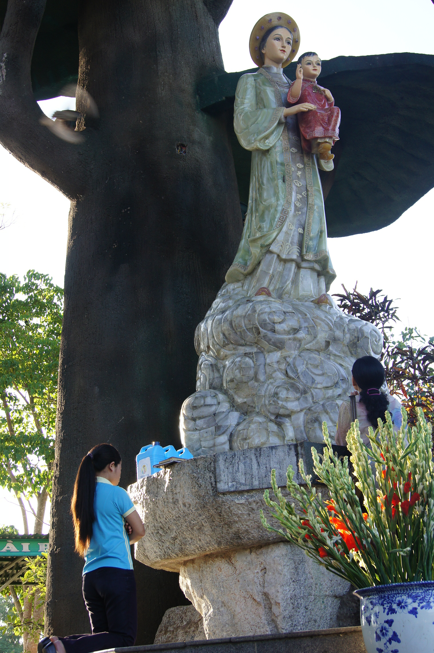 Maria La Vang, tượng đặt dưới chân cây đa